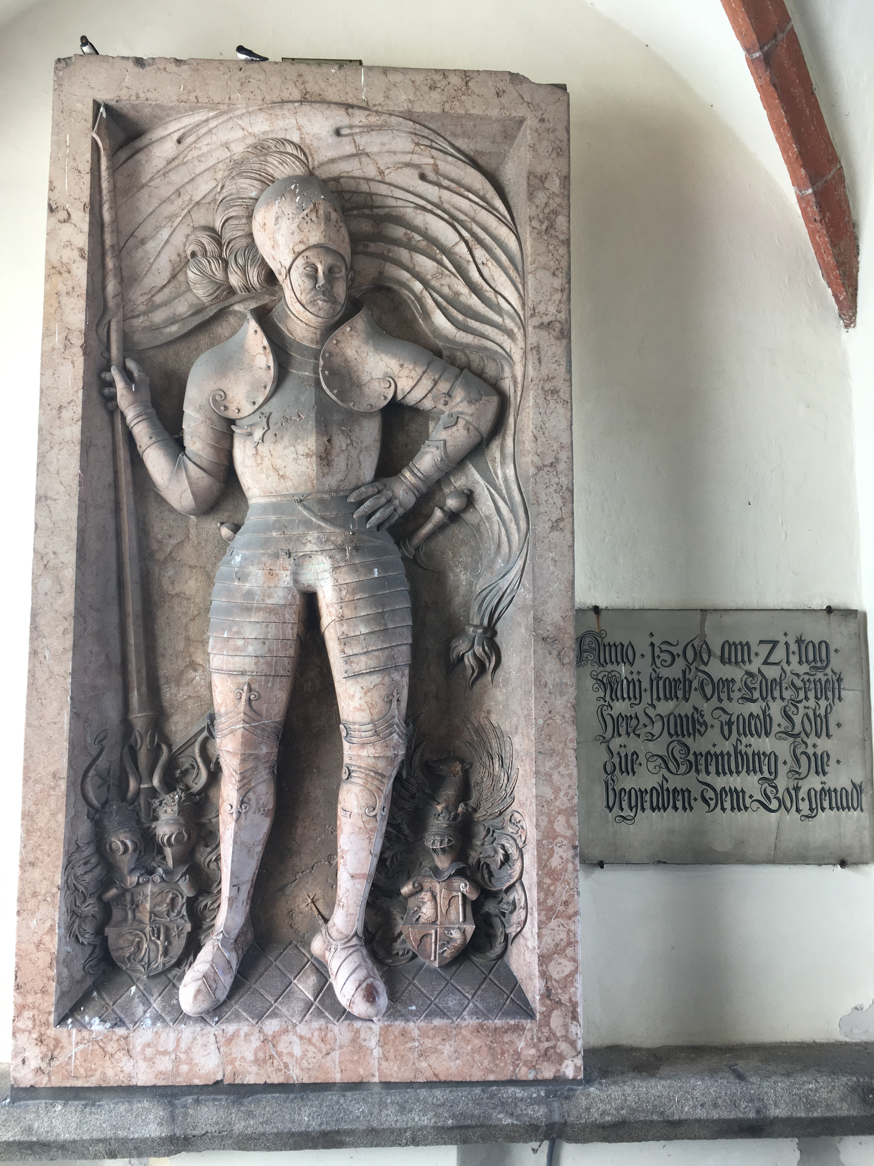 Rittergrabstein des Schlossbesitzers Johann Loeble mit Zusatztafel "Anno 1560 am 21 tag May ..." im Durchgang unter dem Kirchturm